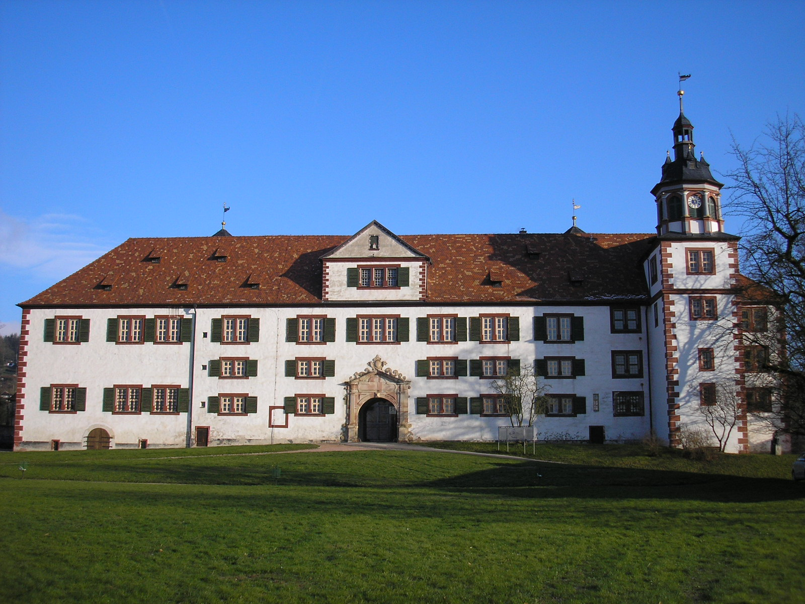 Schloss Wilhelmsburg in Schmalkalden (Thüringen).